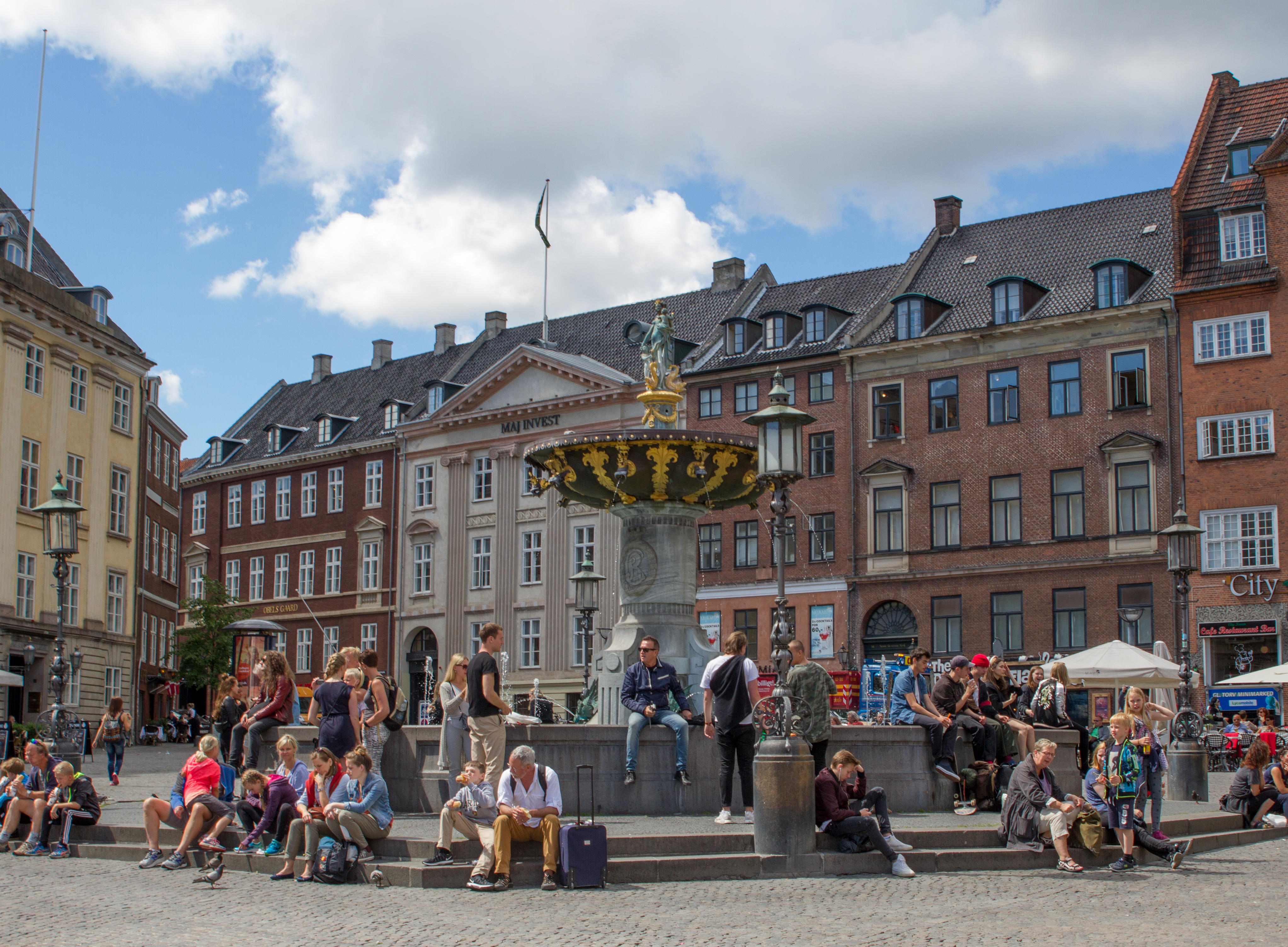 Caritas Fountain in Copenhagen, Denmark